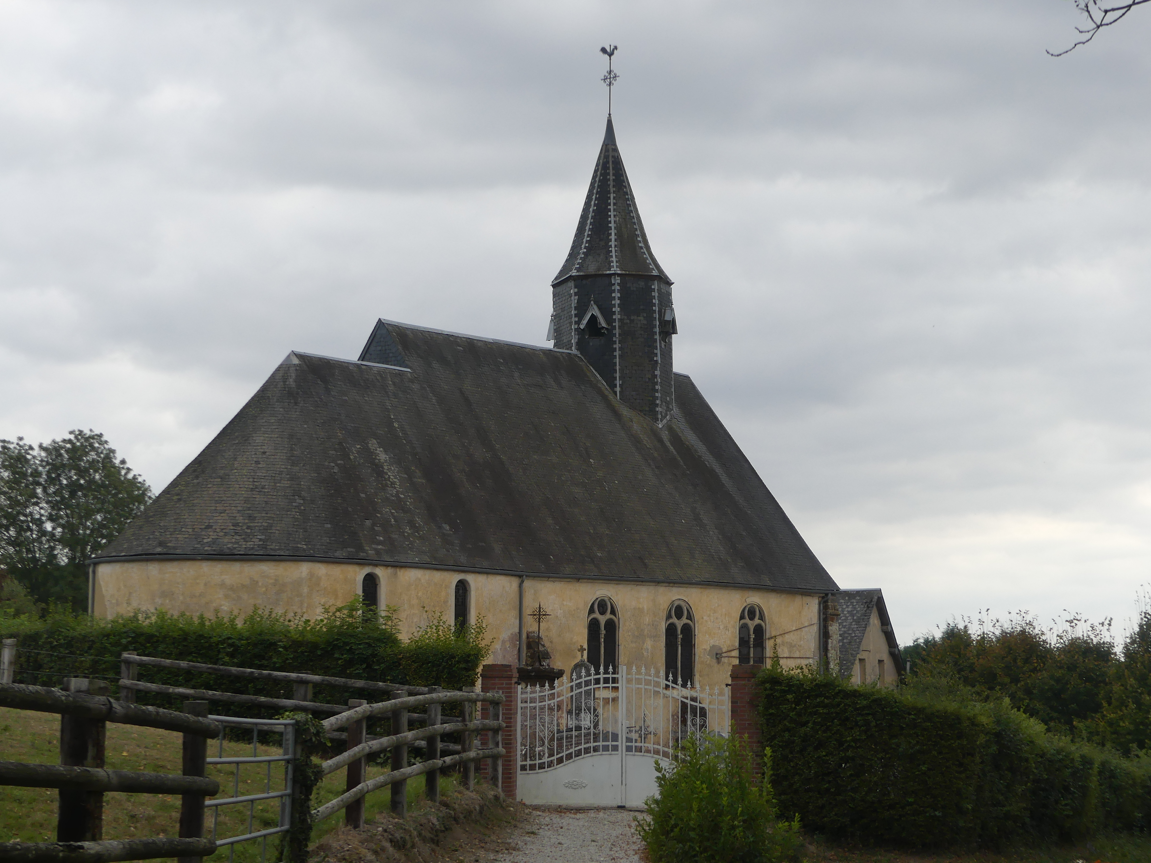 Église romane